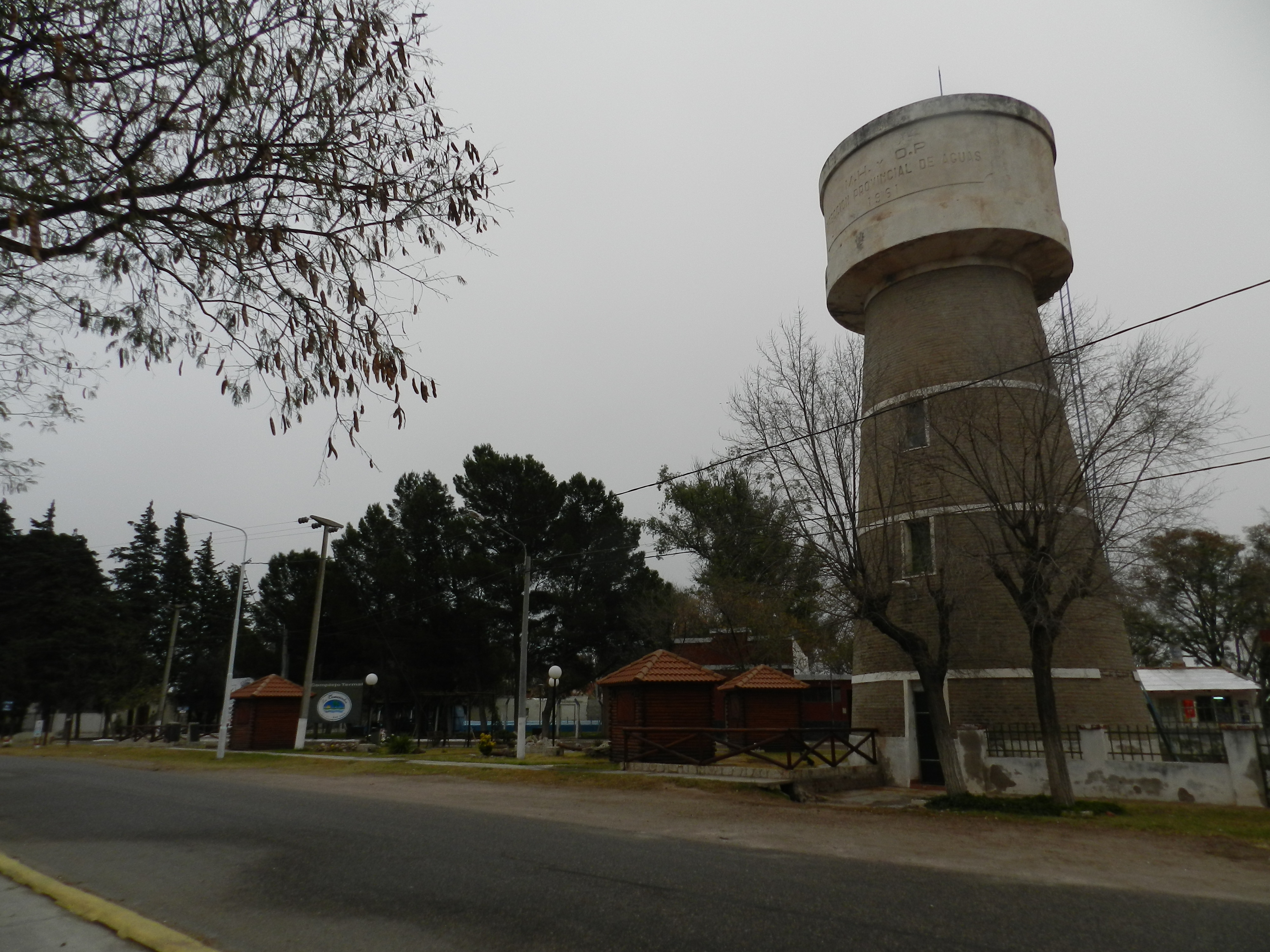 Localidad de Balde, SL